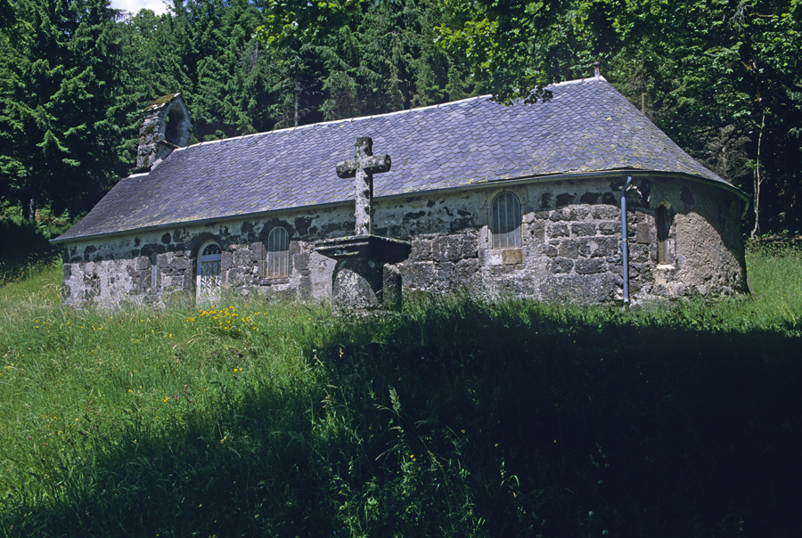 La Chapelle Notre-Dame de Consolation à Thiézac, Cantal, France. .